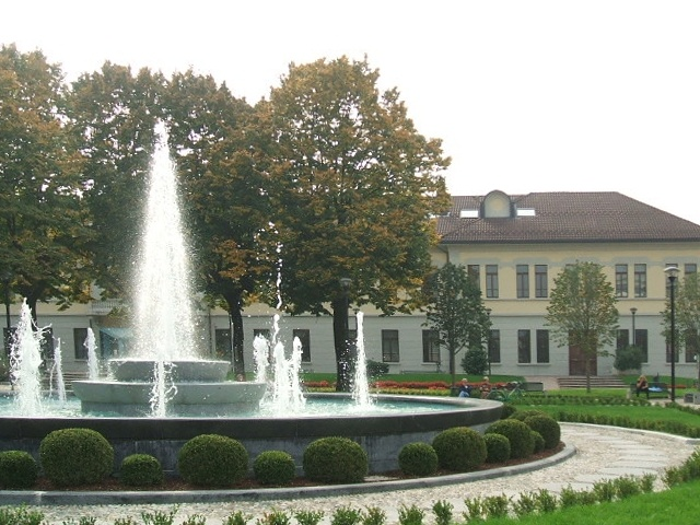 Piazza IV Novembre a Lissone